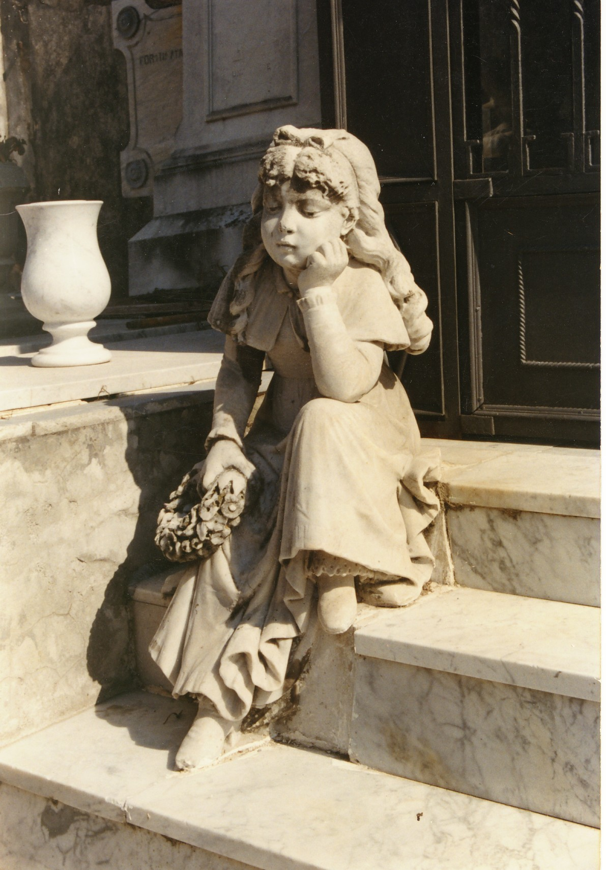 Foto di Riccardo Mazzoni